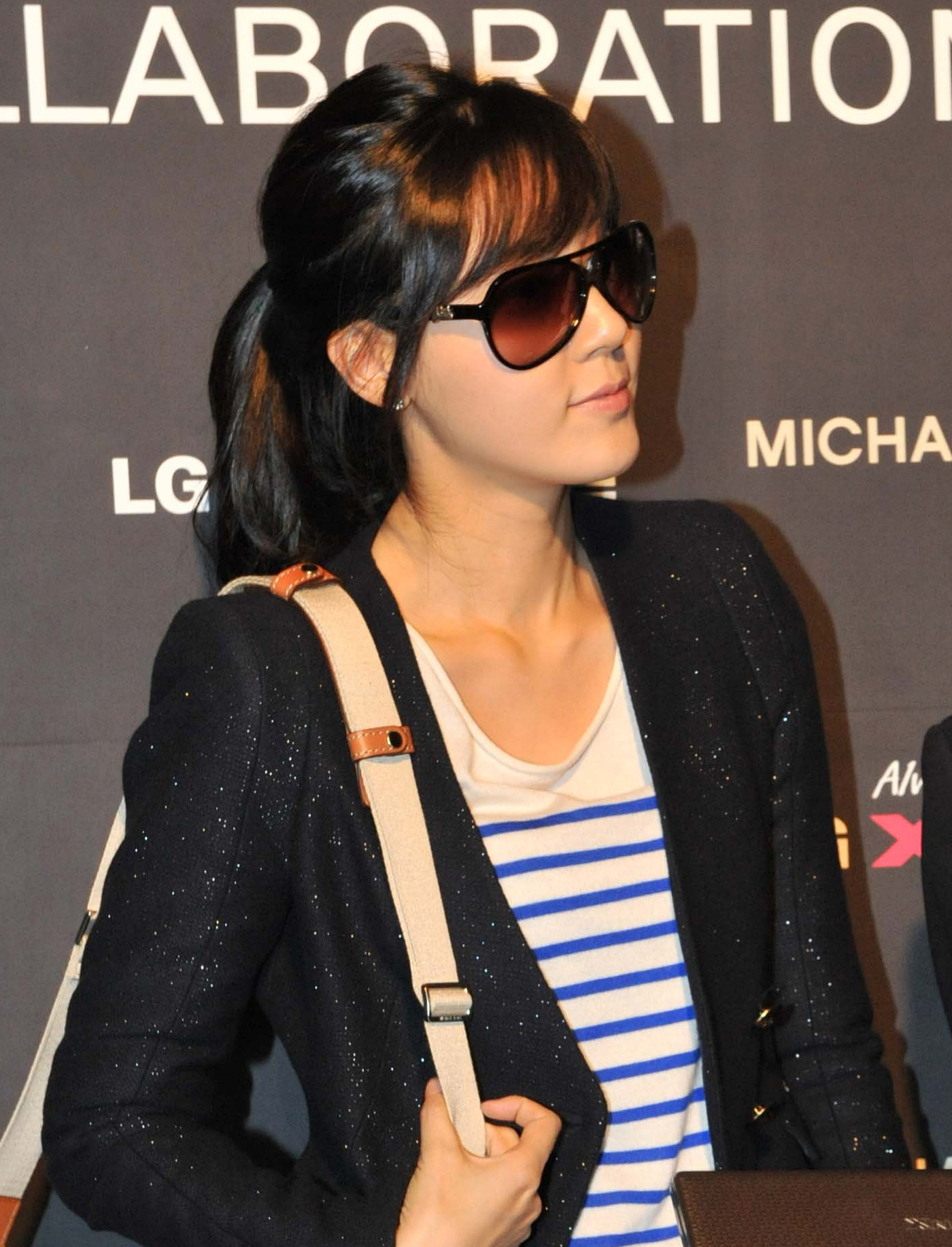 엑스노트 마이클 코어스 에디션 론칭 행사에 참석한 김하늘